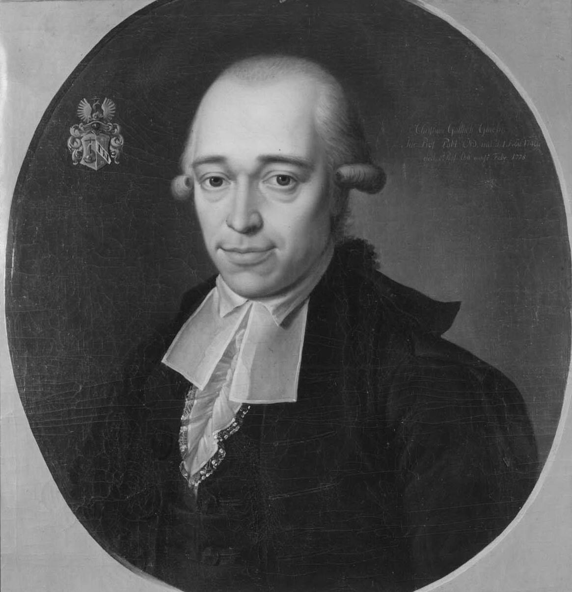 Christian Gottlieb Gmelin; Gemälde der Professorengalerie der Universität Tübingen